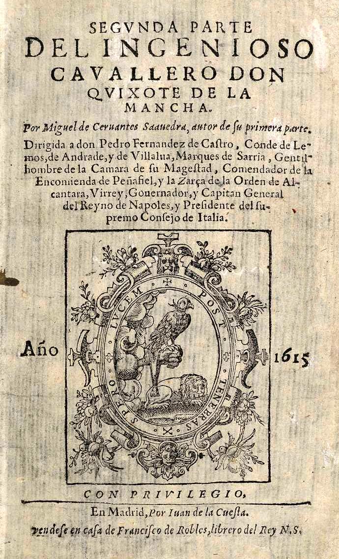 Portada de la primera edición de la segunda parte del Quijote: Miguel de Cervantes, Segunda parte del ingenioso caballero don Quijote de la Mancha, Madrid, Juan de la Cuesta, 1615.